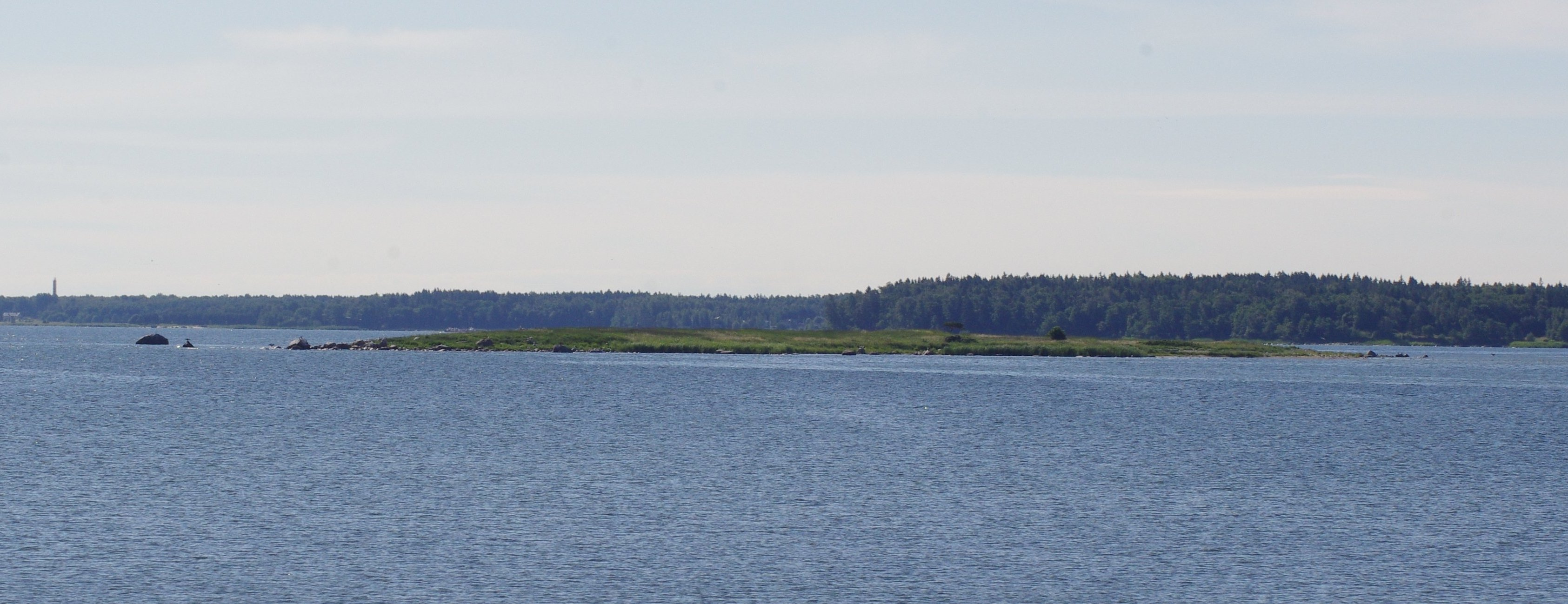 Kumbli loodest